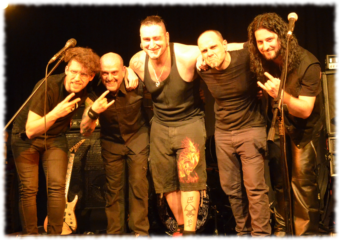 Susurrah 2017